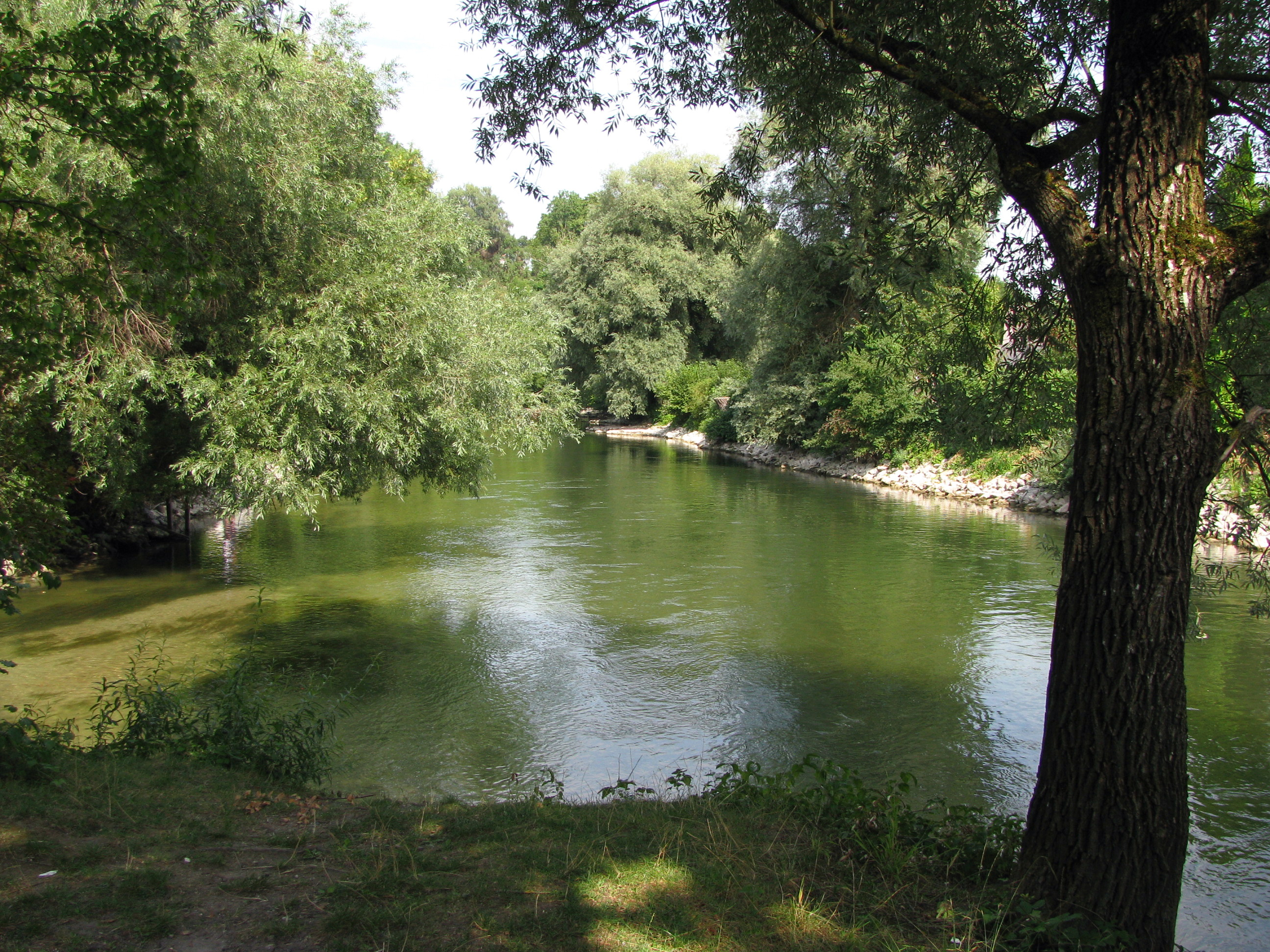 Die Amper in Grafrath im LSG Obere Amper, gesehen von der Amperinsel, flussabwärts.